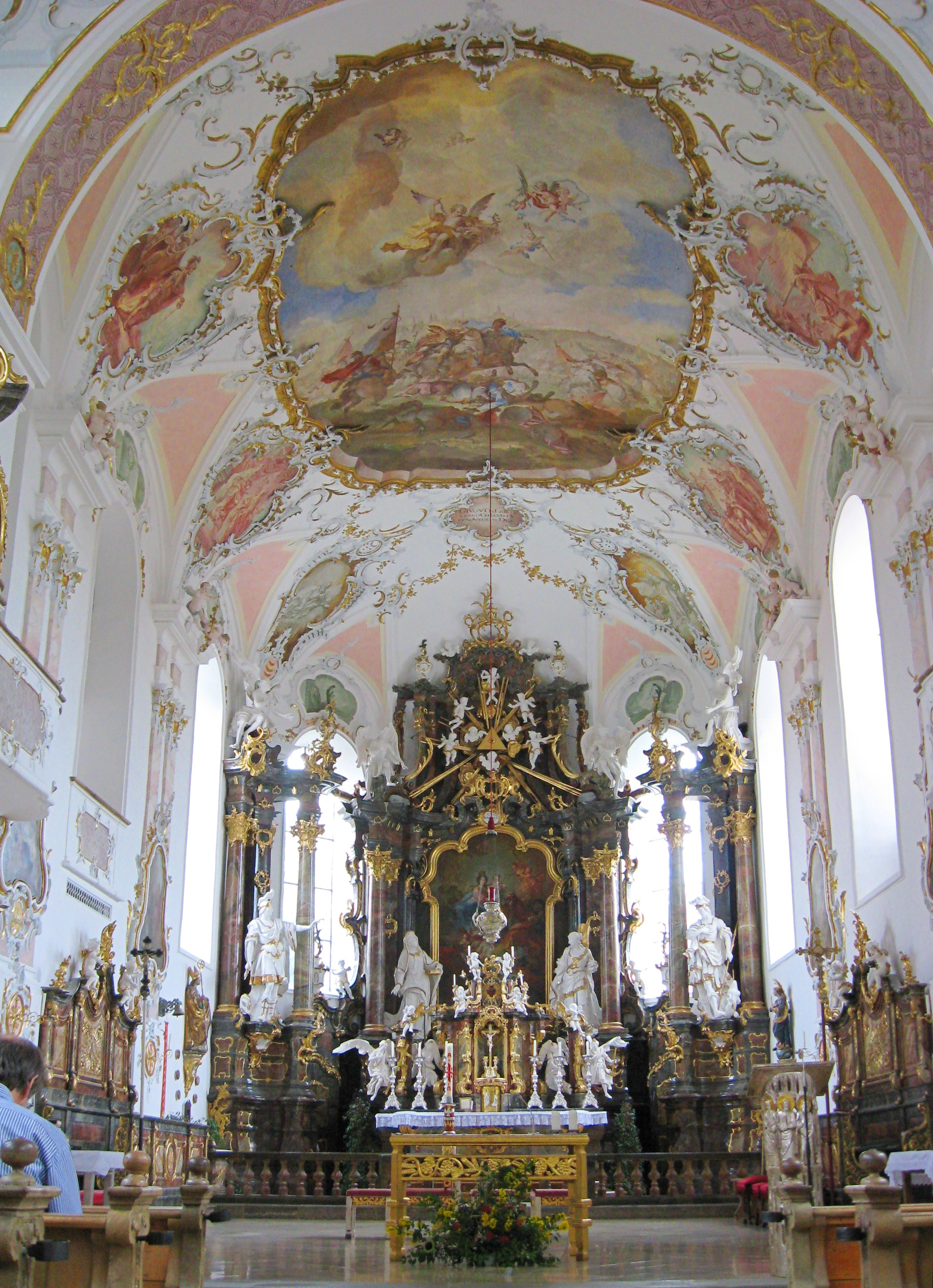 Kirche in Seeg